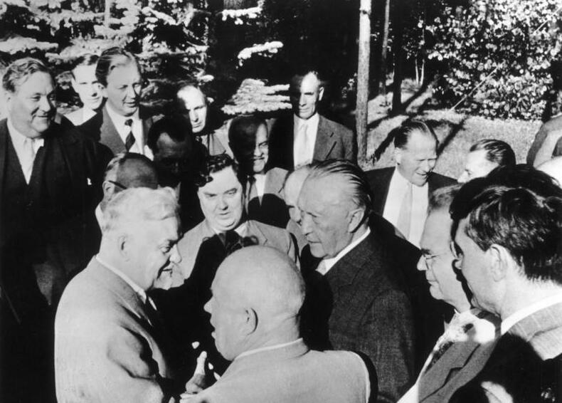 Im September 1955 besucht Bundeskanzler Dr. Konrad Adenauer Moskau. Die Gespräche mit Bulganin, Malenkow und Chrustschow (von links) führen zur Aufnahme diplomatischer Beziehungen zwischen der Sowjetunion und der Bundesrepublik Deutschland.